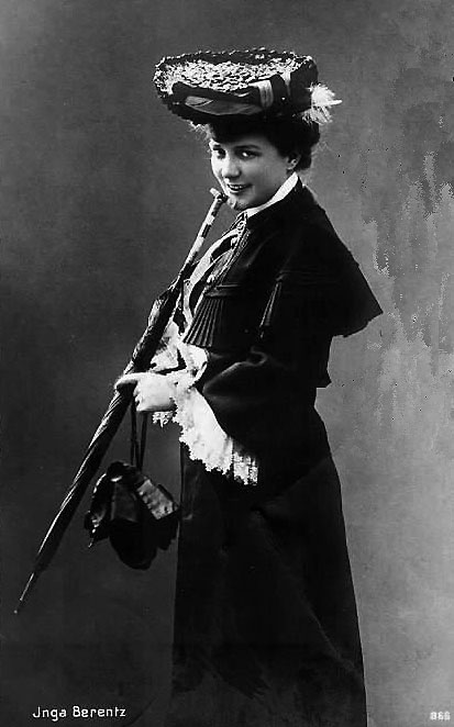 Inga Berentz